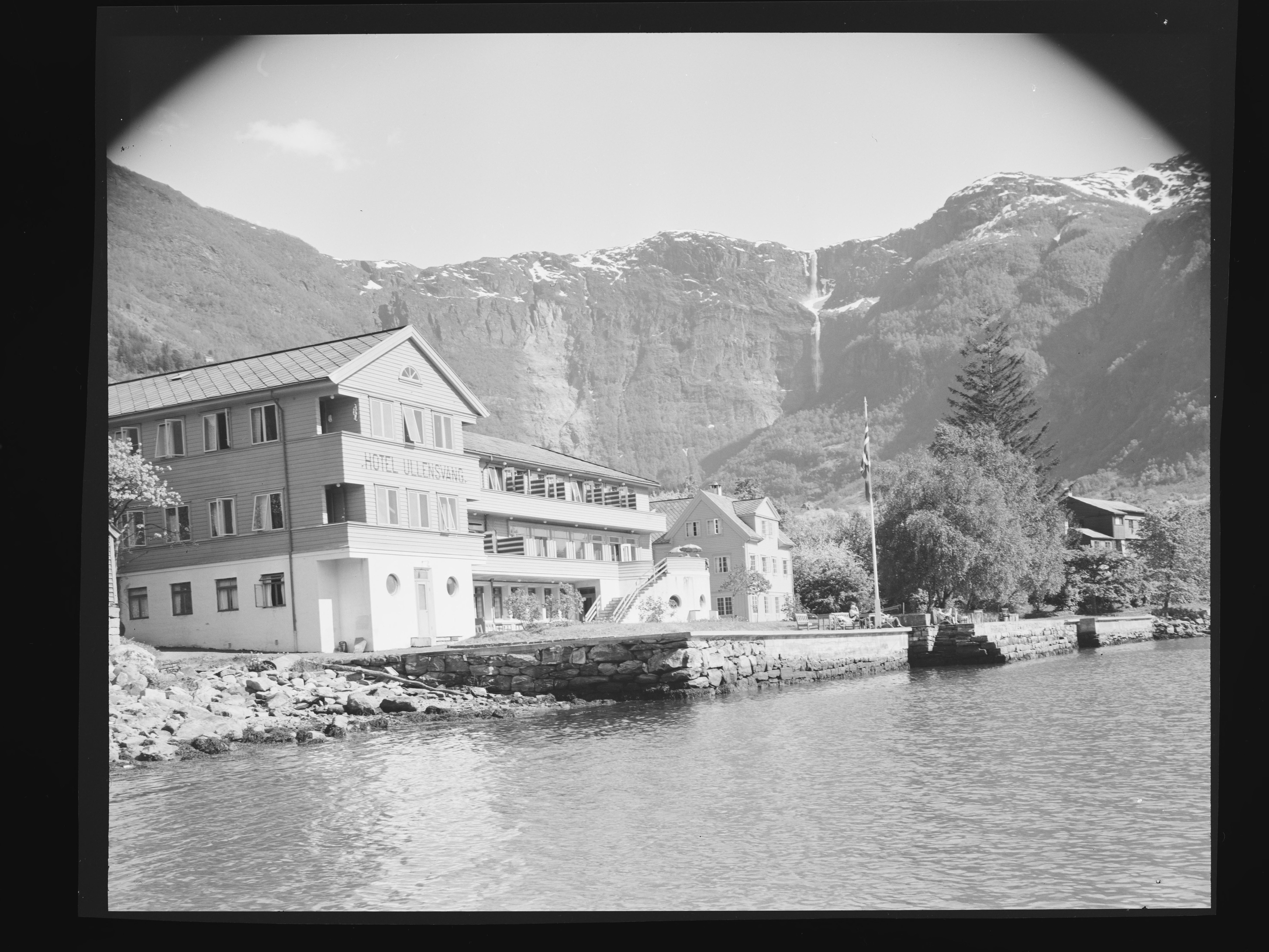 Bildet er hentet fra Nasjonalbibliotekets bildesamling Lofthus, Ullensvang, Hordaland